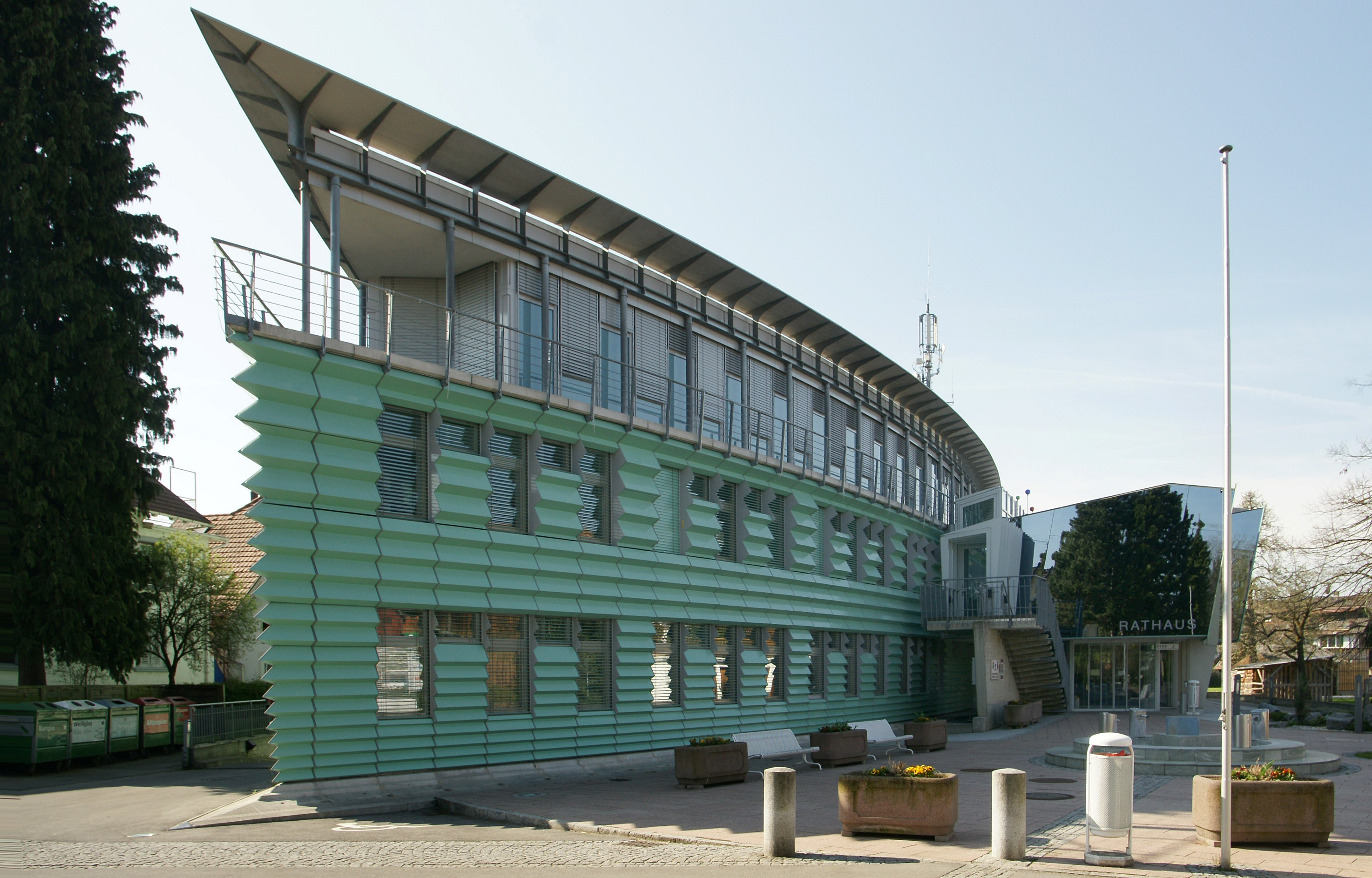 Das Rathaus von Hard erbaut in den Jahren 1994 bis 1996 nach Plänen von den Architekten Klas & Lässer Fab-02.